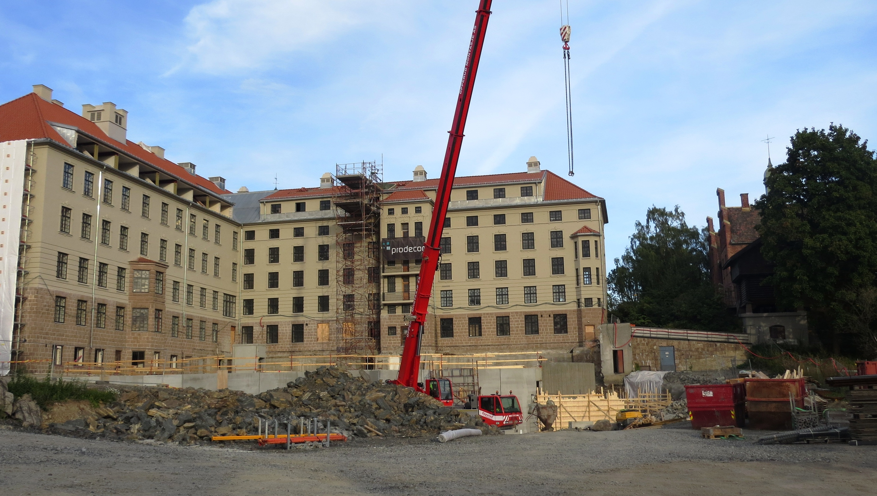 Ringstadbekk, mellom Bekkestua og STabekk - i Bærum kommune